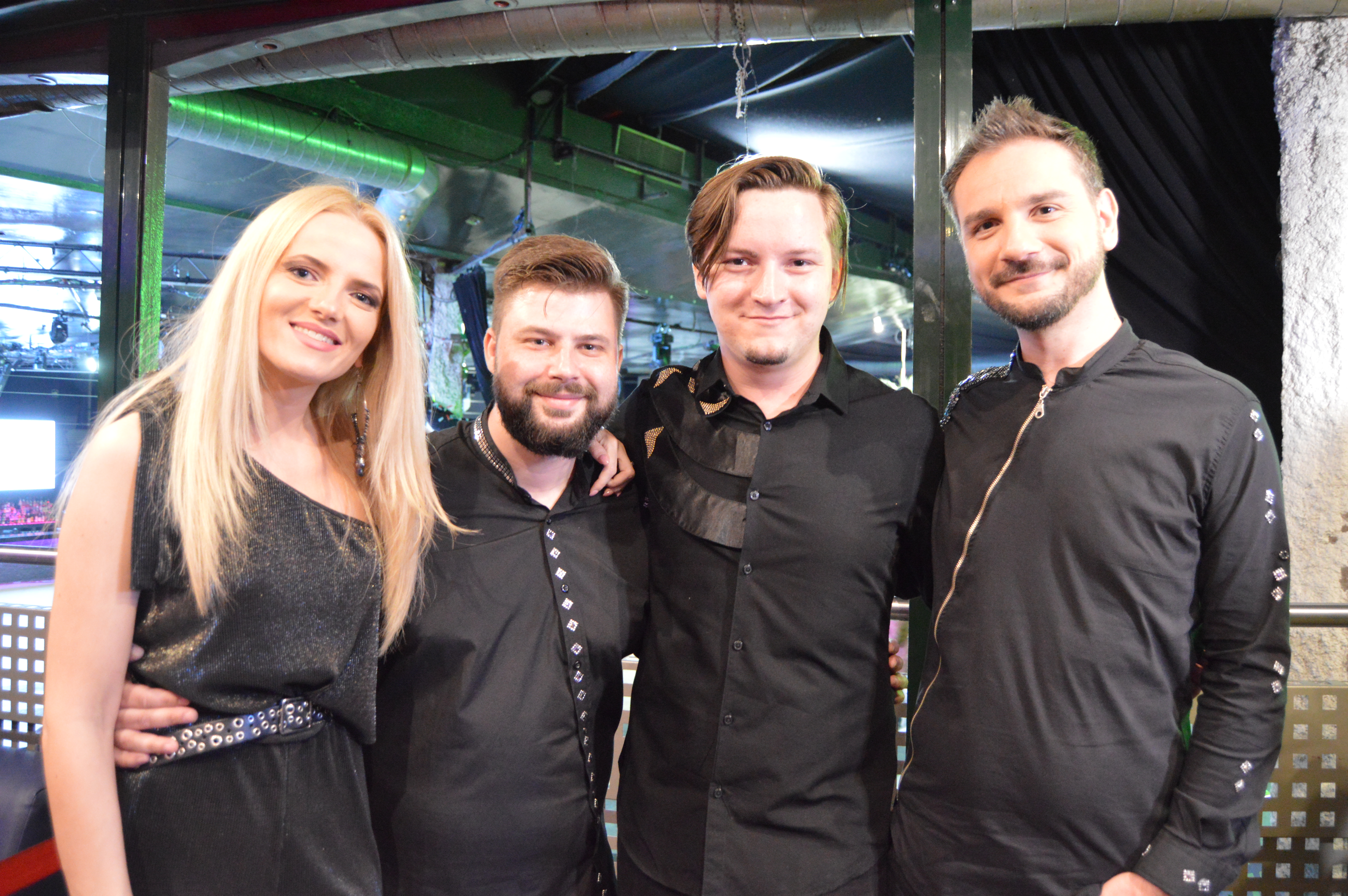 El grupo de rock The Humans en la Eurovision Spain PreParty en Madrid (Abril 2018)